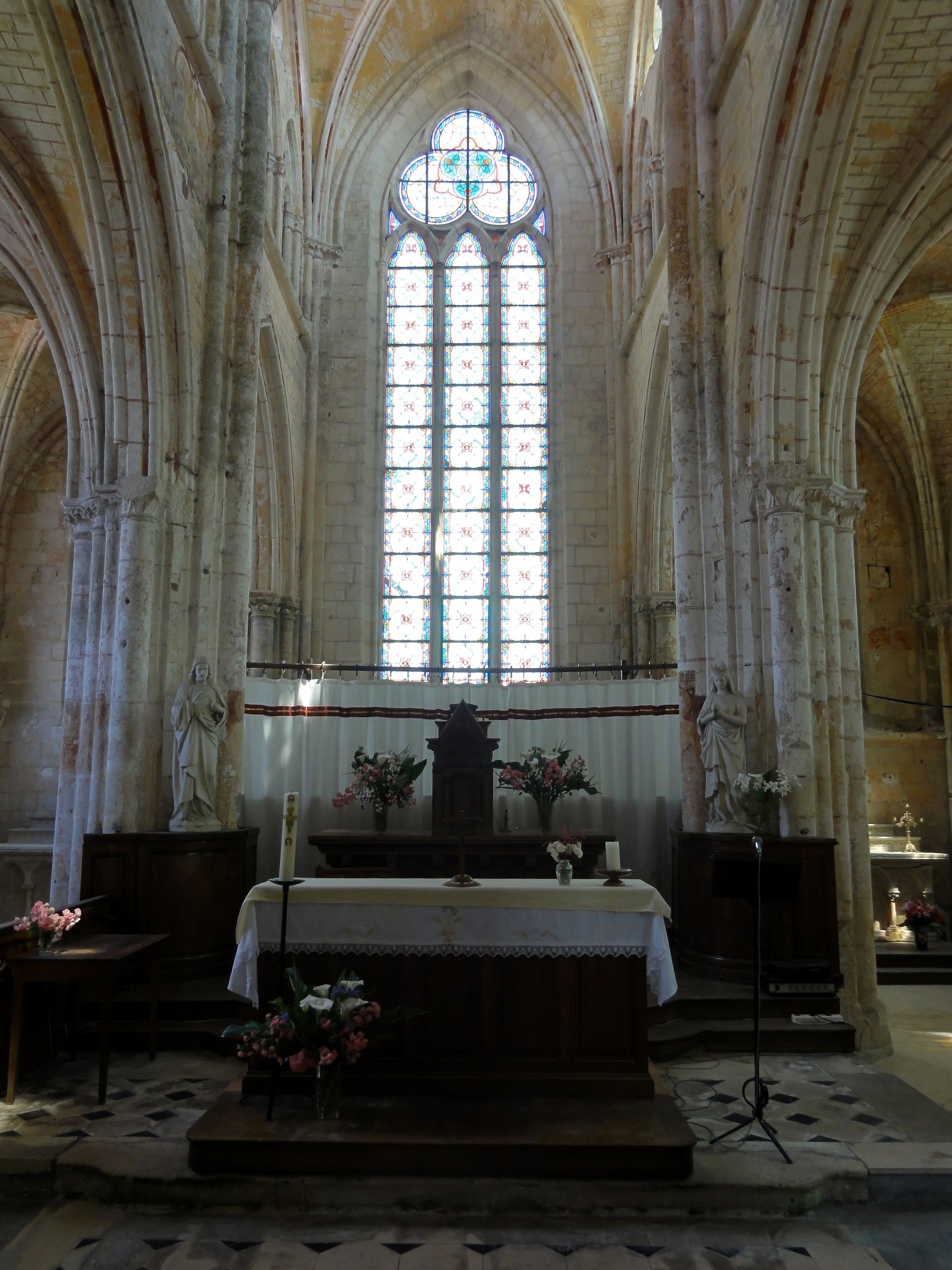 Maître-autel.